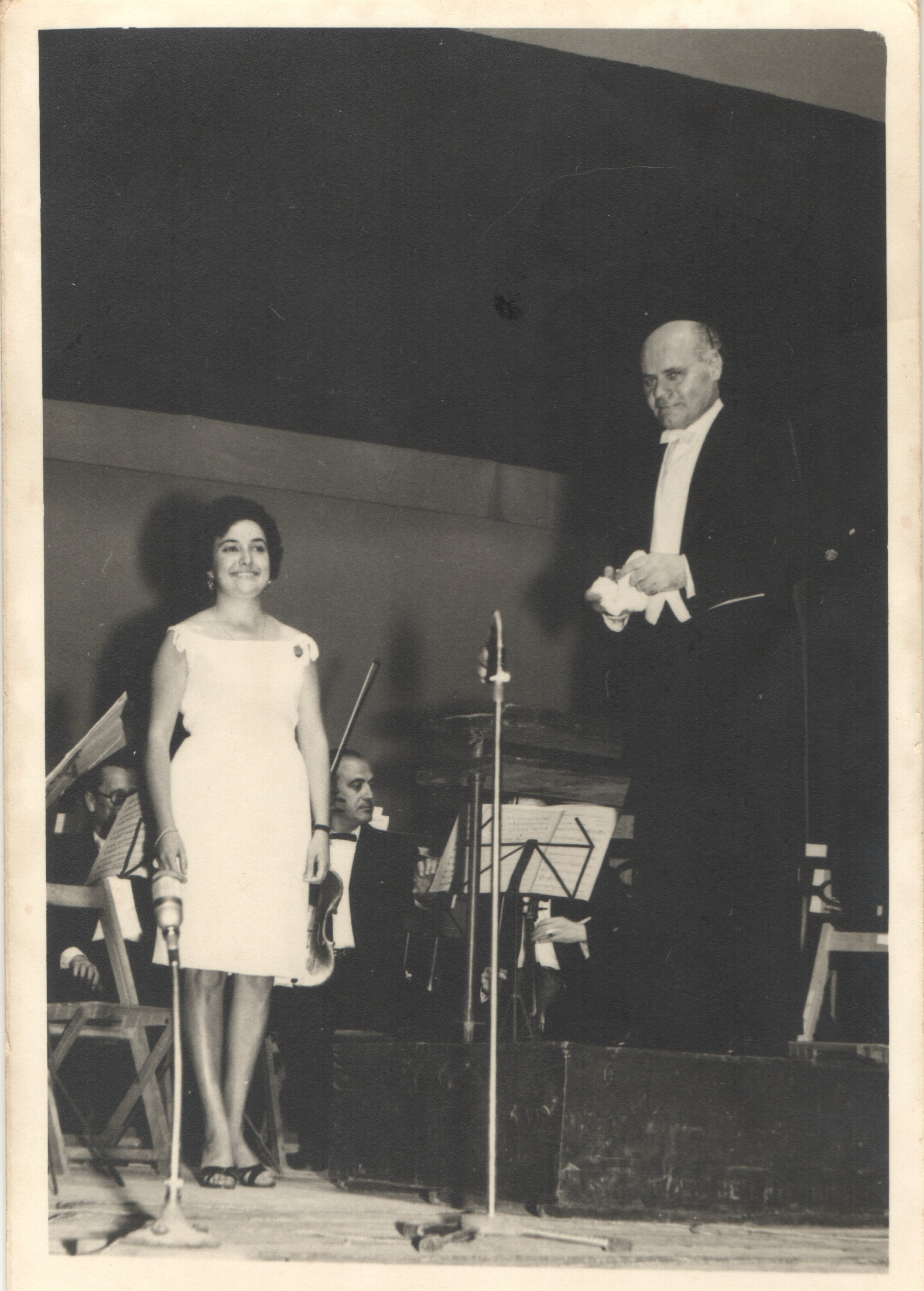 Concierto dirigido por